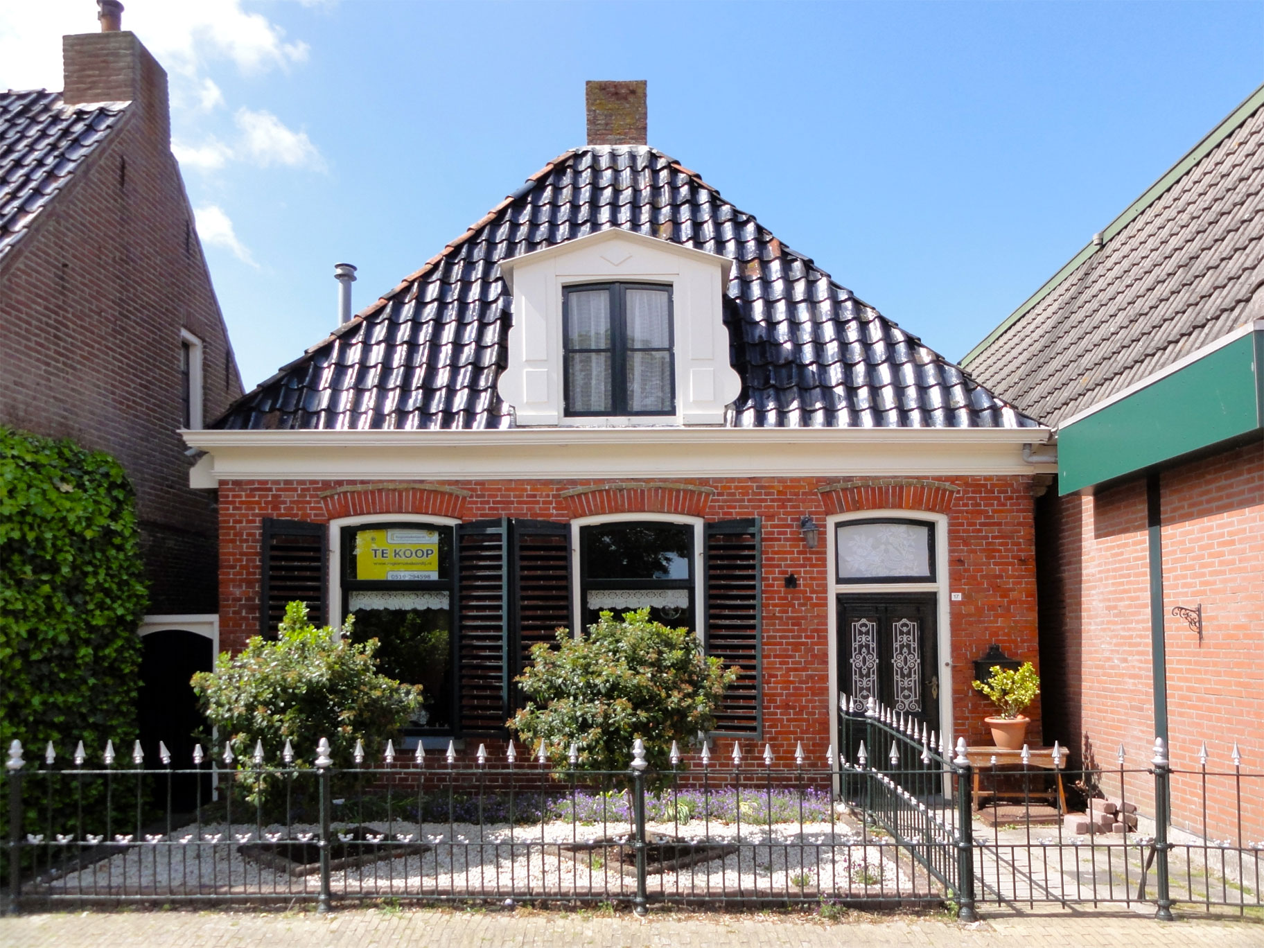 Nije Buorren 17 in Ferwerd